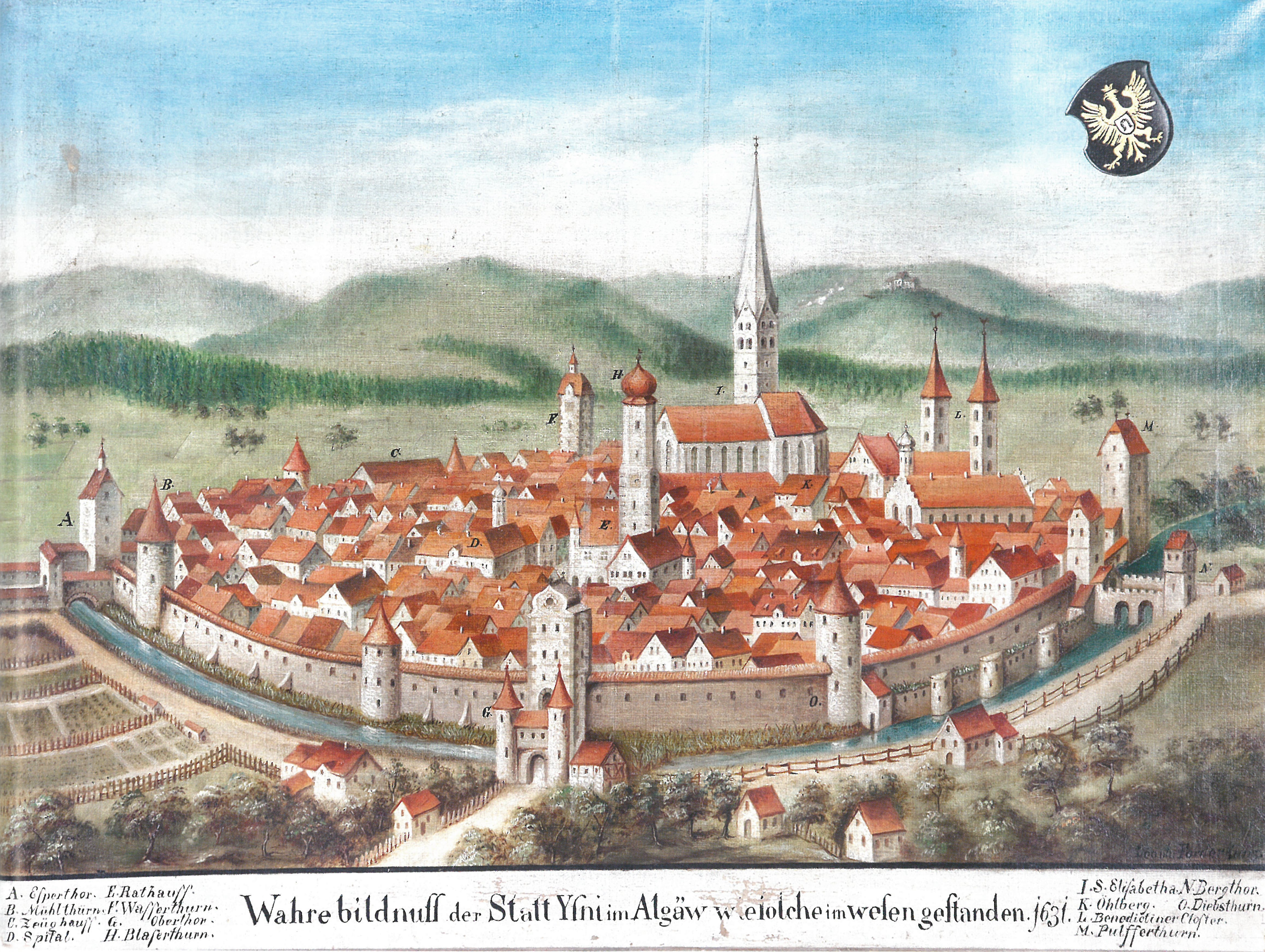 Wahre bildnuss der Statt Ysny im Algäw wie solche im wesen gestanden. 1631, Zustand vor dem Brand von 1631; Stadtarchiv Isny